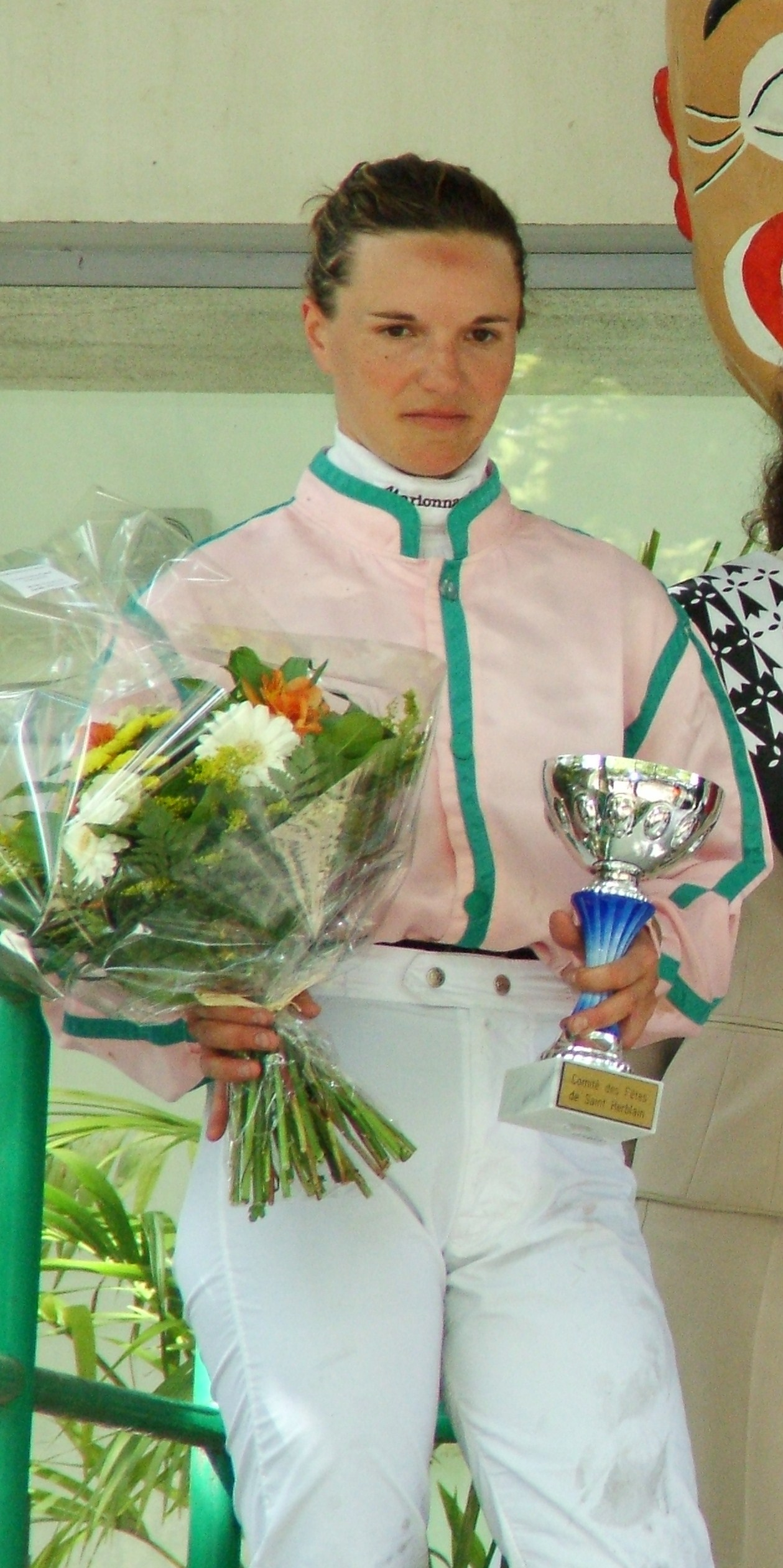 Nathalie HENRY à NANTES